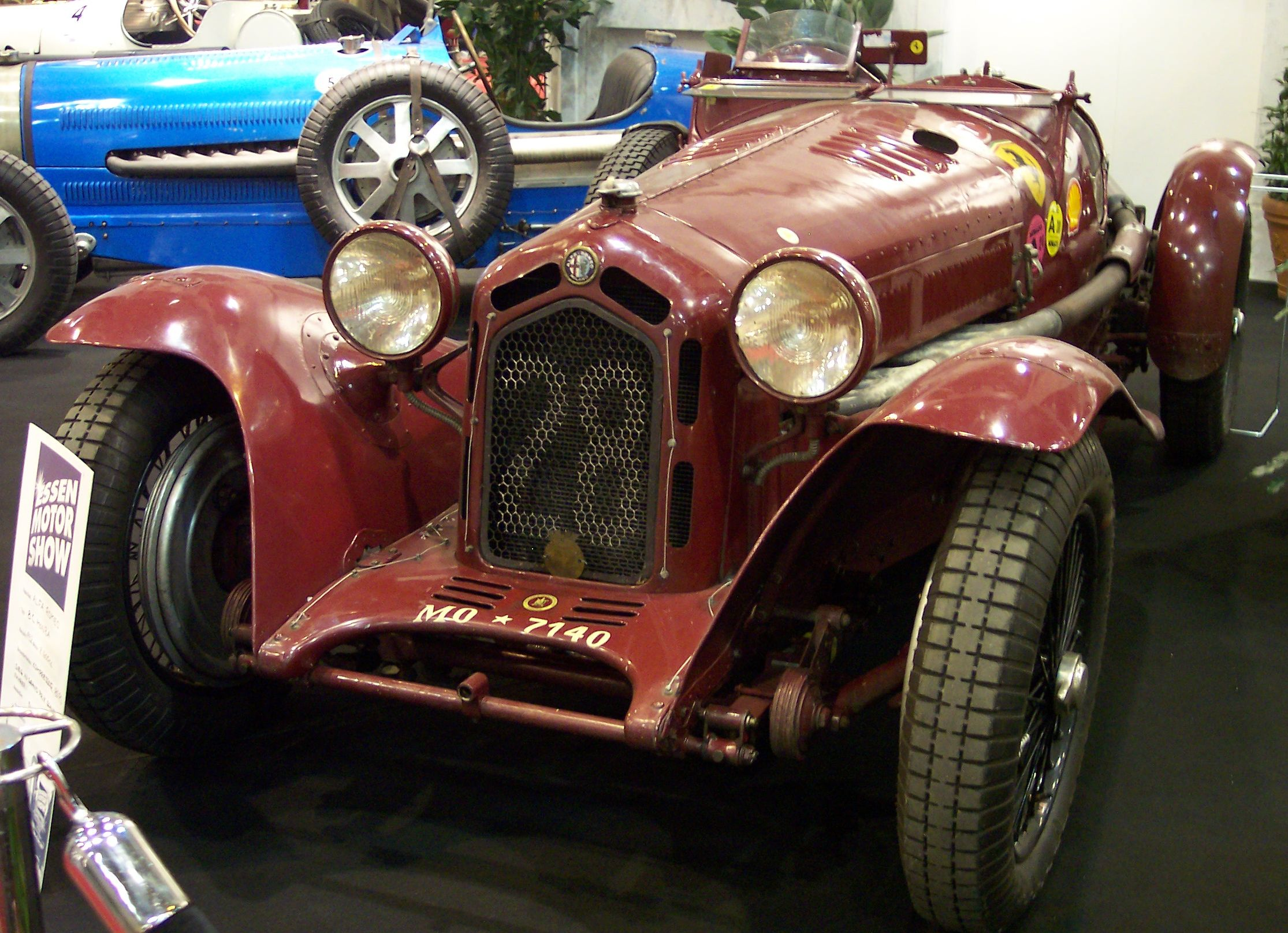 Source: Eigenes Bild